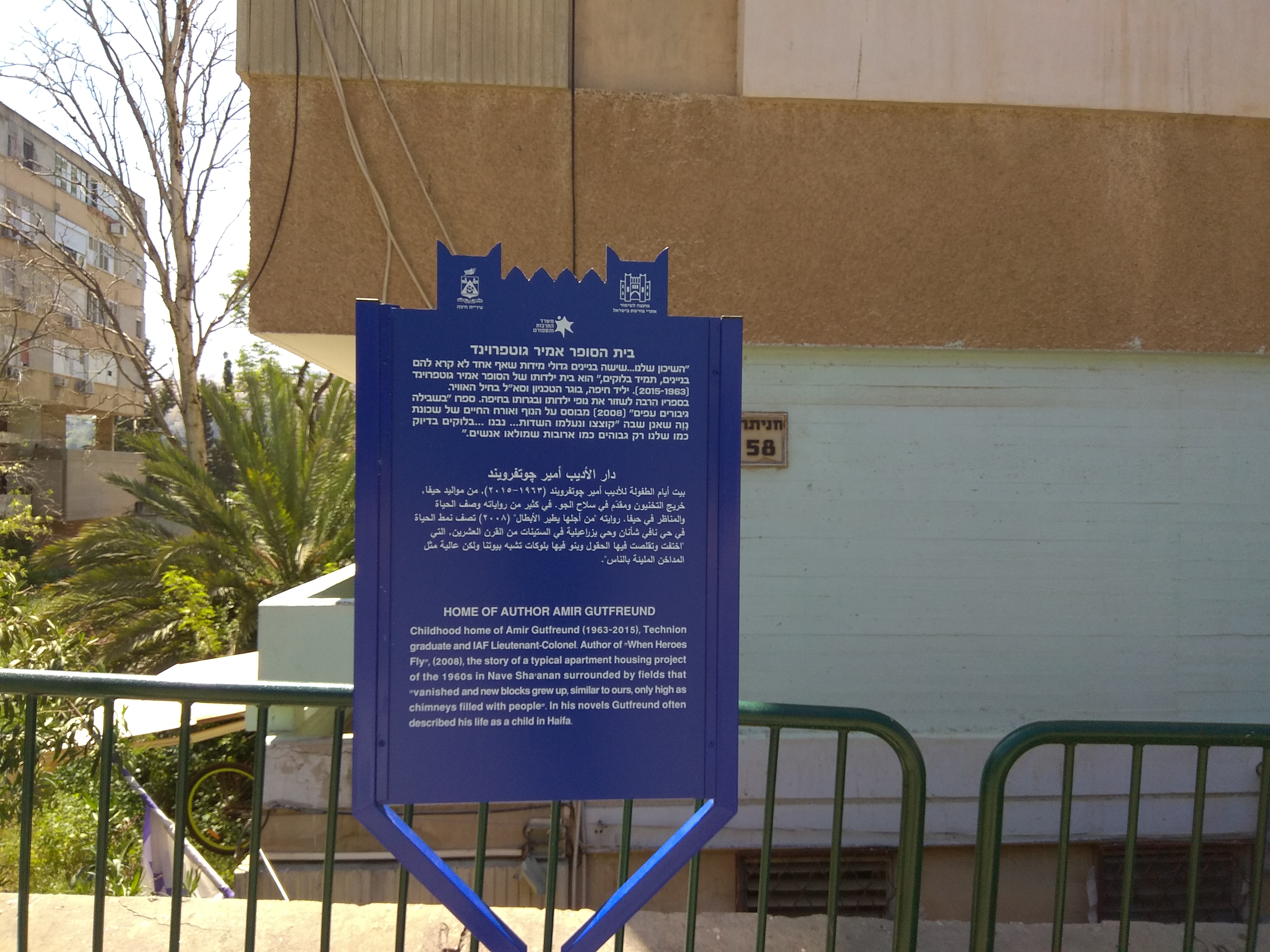 שלט הנצחה ליד בית ילדותו של אמיר גוטפרוינד